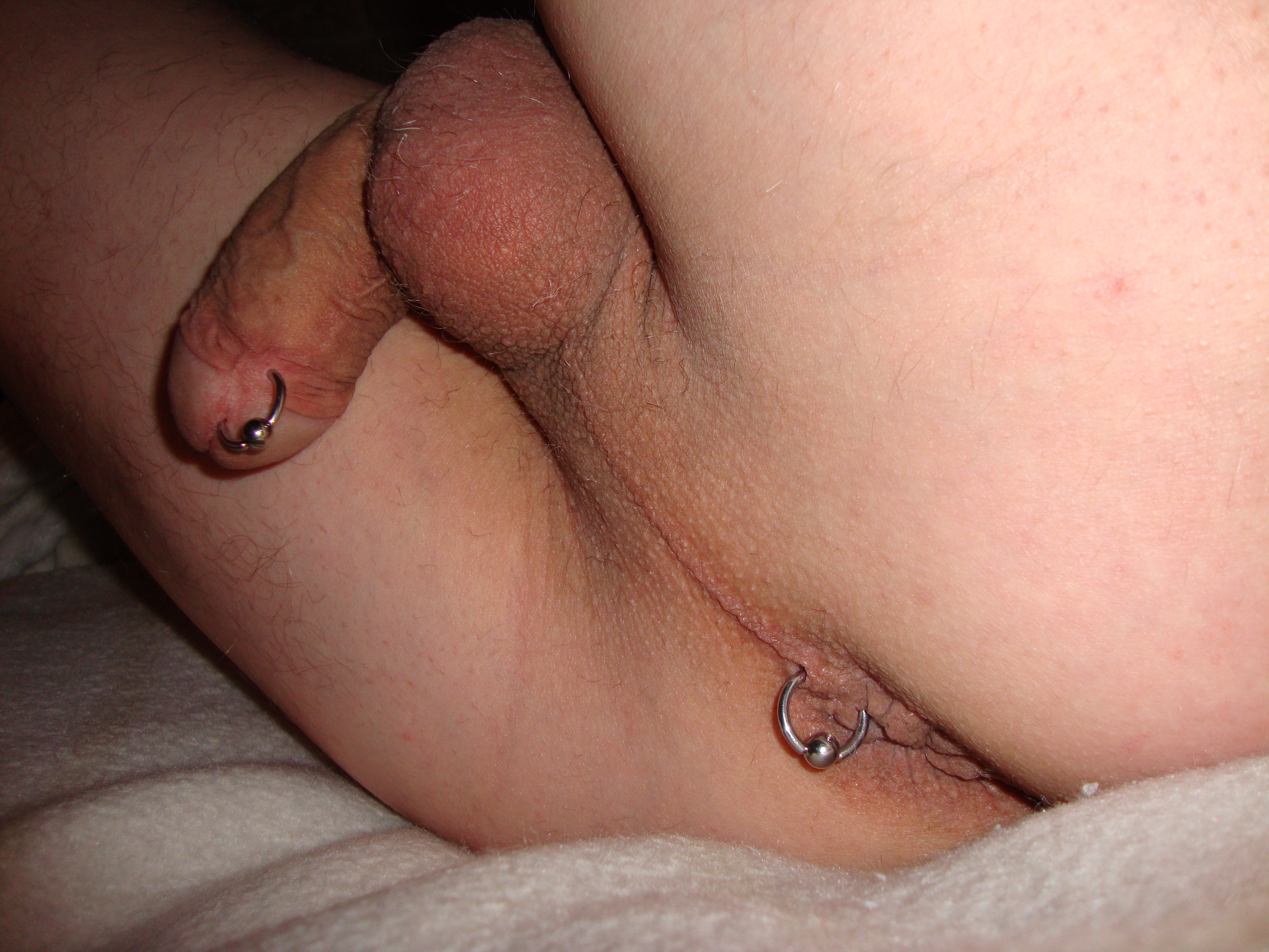 Anal Piercing beim Mann,Prinz Albert Piercing